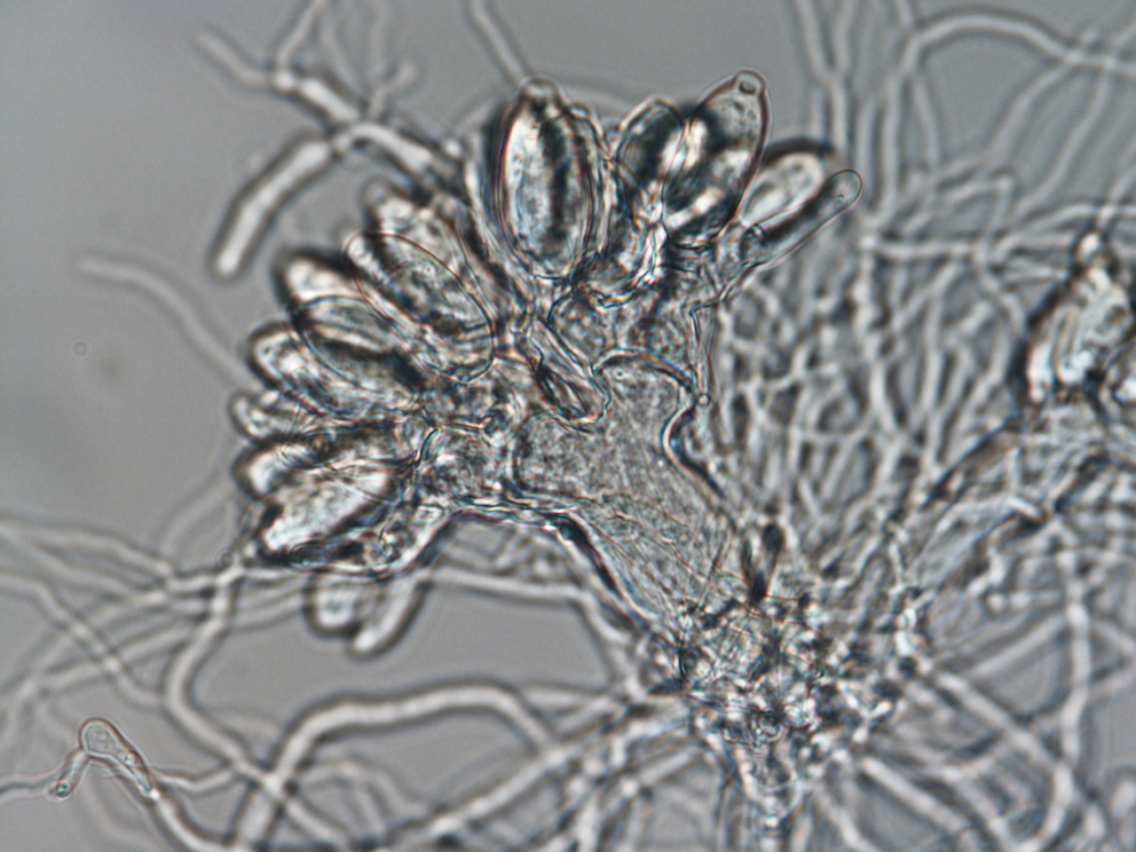 果実によって分離後、培養したコウマクノウキン属の光学顕微鏡写真